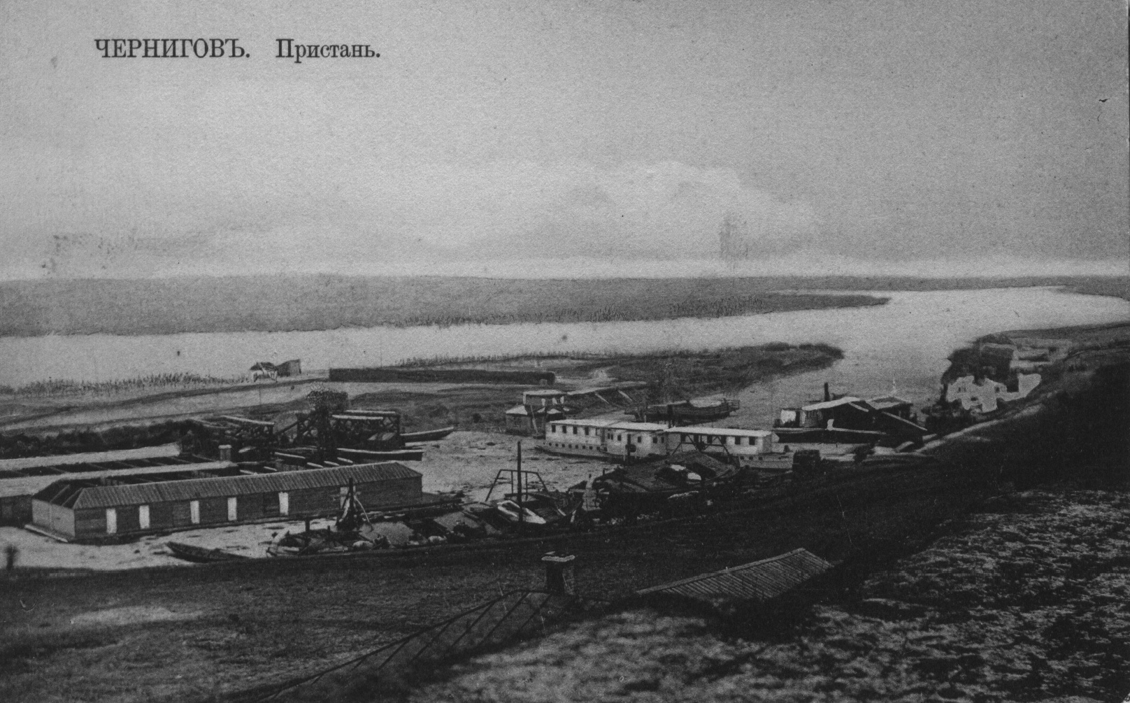 Пристань Чернігова 1911 р.